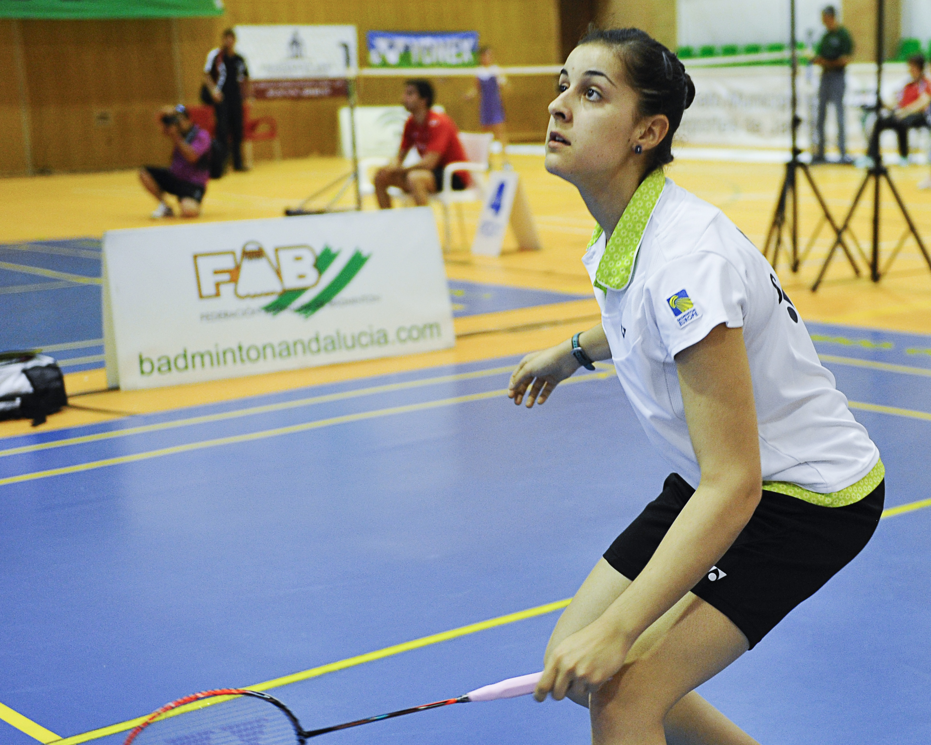 Campeonato de España 2014 en Jaén